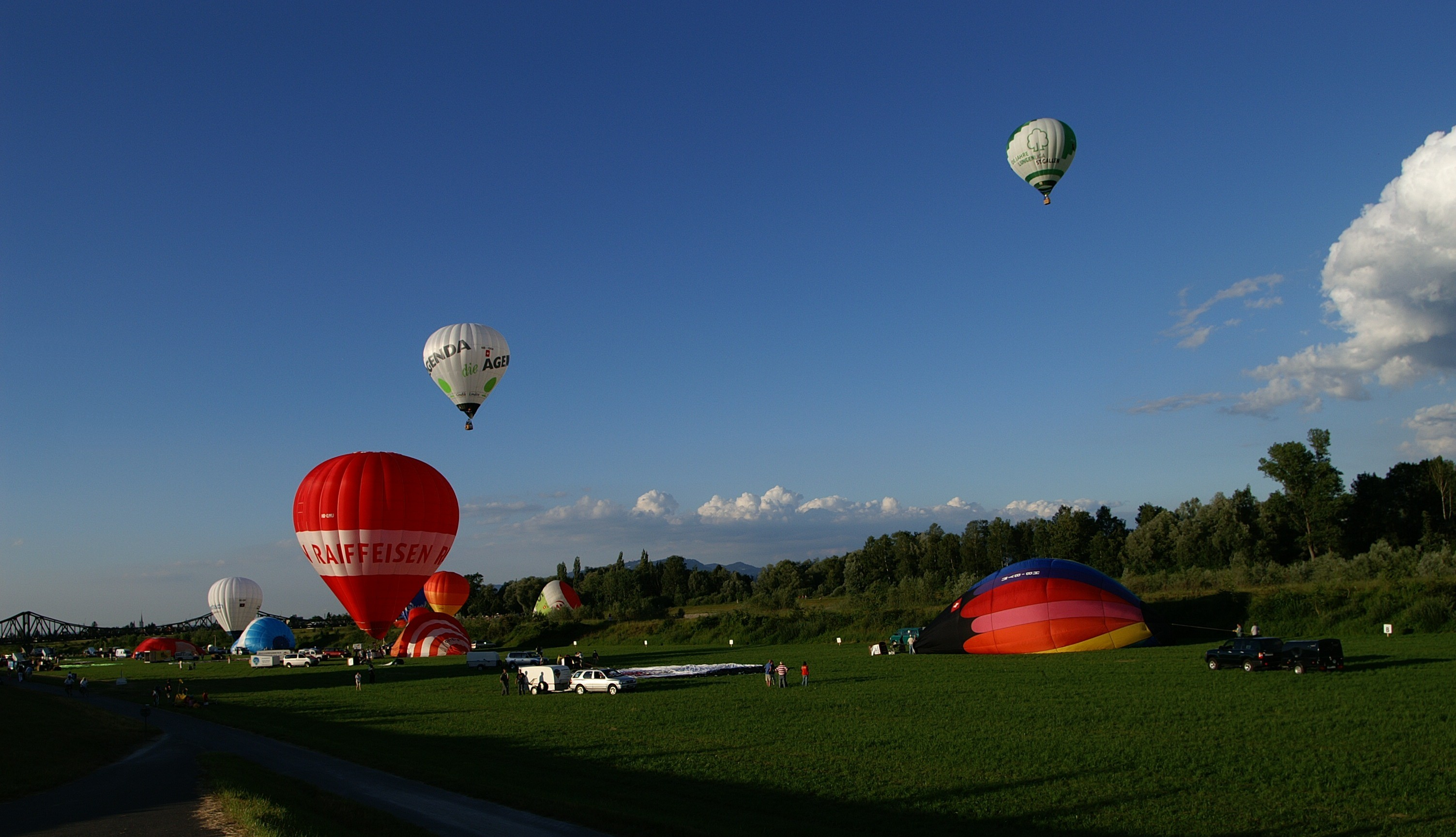 Heißluftballon Gesehen auf den "internationalen Ballontagen Alpenrheintal" [1] auf dem Brückenfestival [2] Wiesenrain in Lustenau - Widnau.